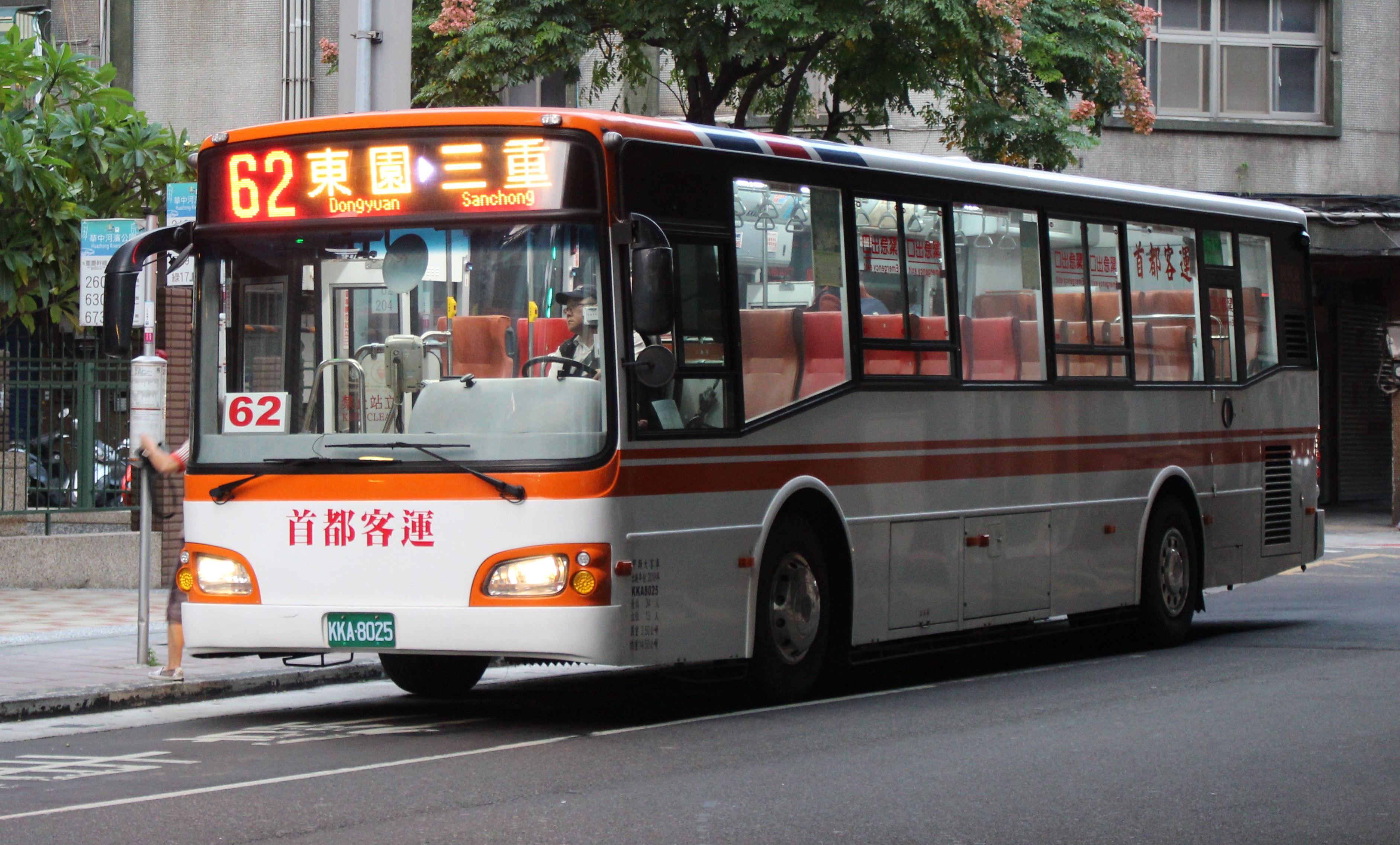 中文（台灣）: 首都客運2018年日野RK8JRVA-KJF大客車KKA-8025，行駛62線，停靠臺北市聯營公車「華中河濱公園」站牌。